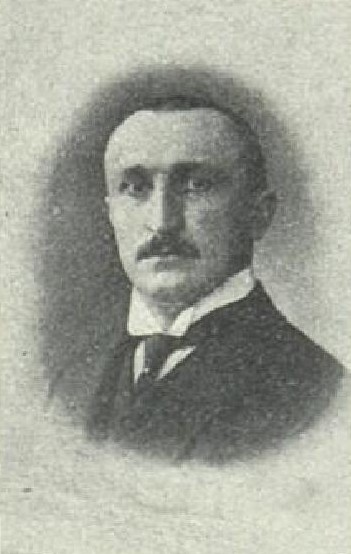 Ludvík Pazderka (1868-1951), rakouský a český statkář a politik